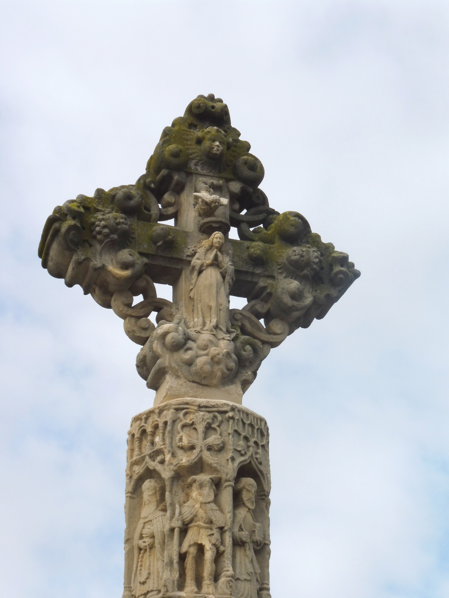 Creu de terme (Castellserà): revers, amb la figura de la Verge